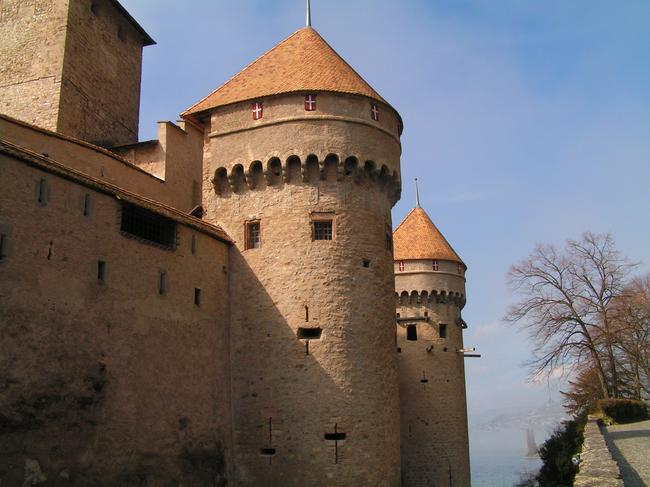 Teilansicht Schloss Chillon, Veytaux-Montreux, Schweiz